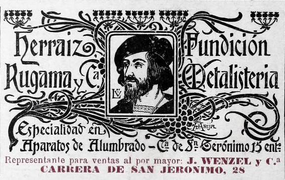 Herraiz, Rugama y Cª. Fundición Metalistería.